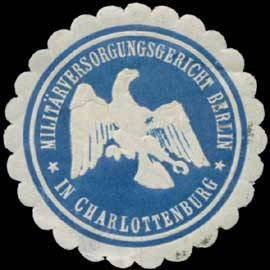 Sealing stamp Title: Militärversorgungsgericht in Charlottenburg Description: blau, weiß, geprägt Place: Berlin size: 4 cm